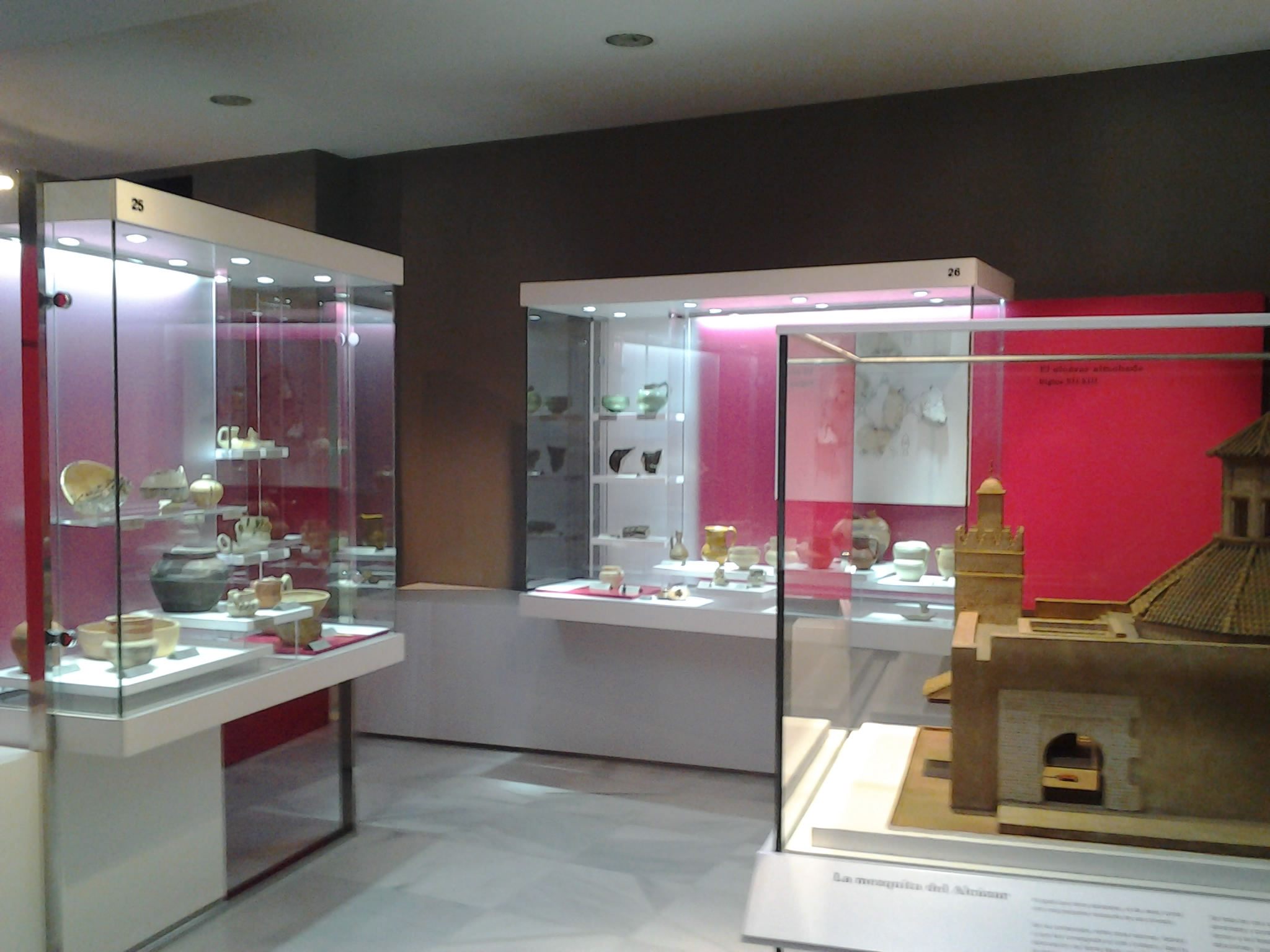 Museo Arqueológico de Jerez de la Frontera, Cádiz. Sala dedicada a la etapa andalusí de la ciudad.